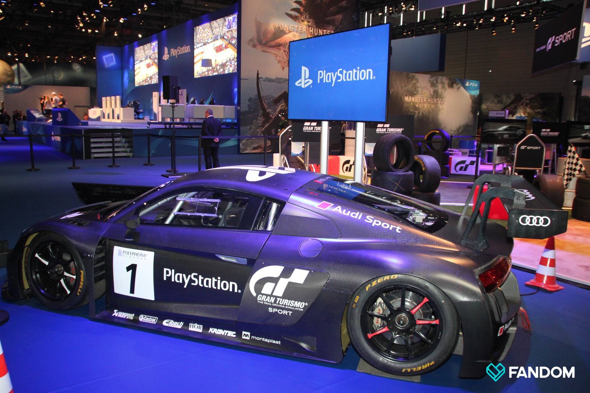 FANDOM für euch auf der gamescom unterwegs... Sonstige Neuigkeiten